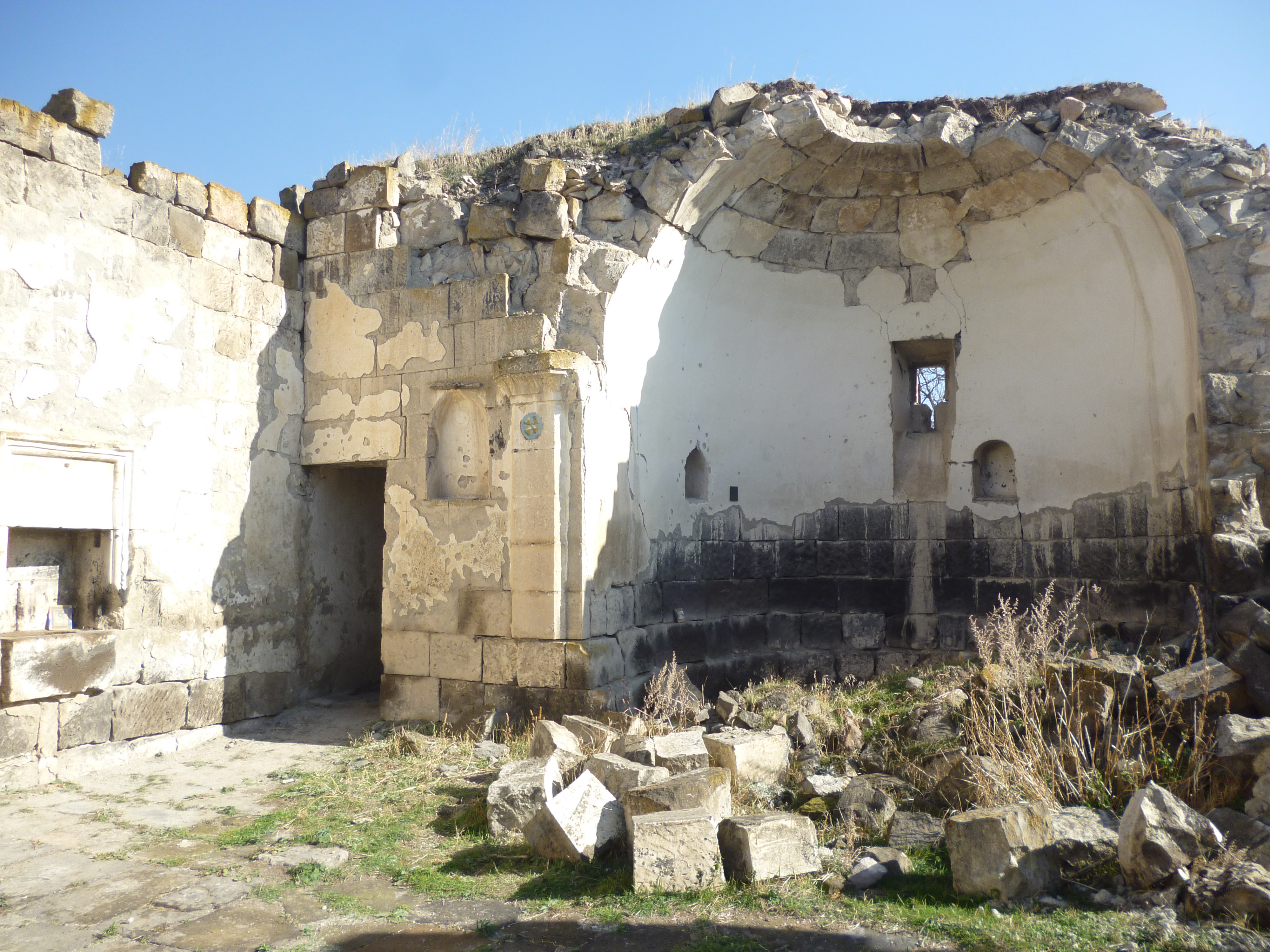 19-րդ դարի վերջում կառուցված բազիլիկ եկեղեցի Շիրակի մարզի Հացիկ գյուղում